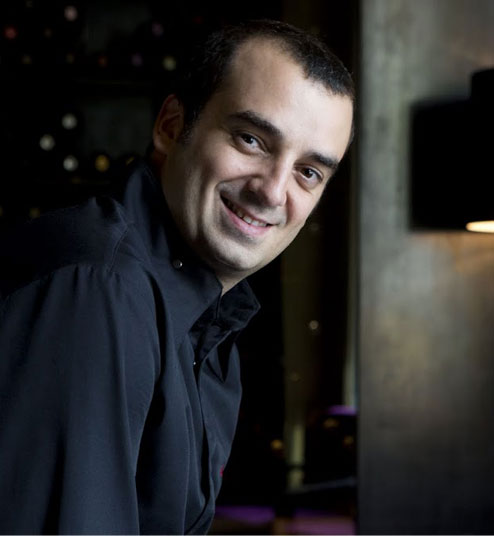 Chef cuisinier étoilé